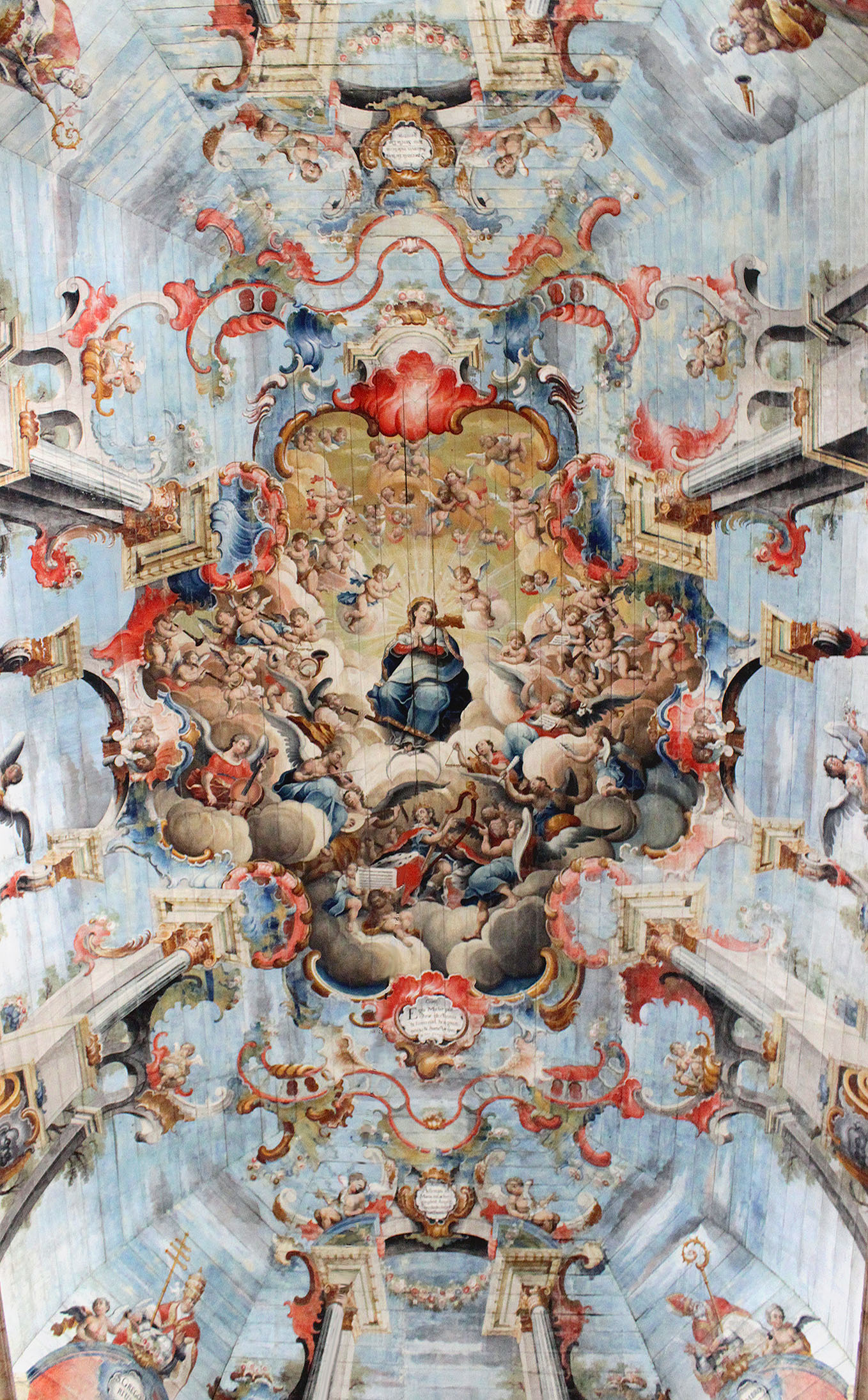 Glorificação de Nossa Senhora entre anjos músicos, de Mestre Ataíde.